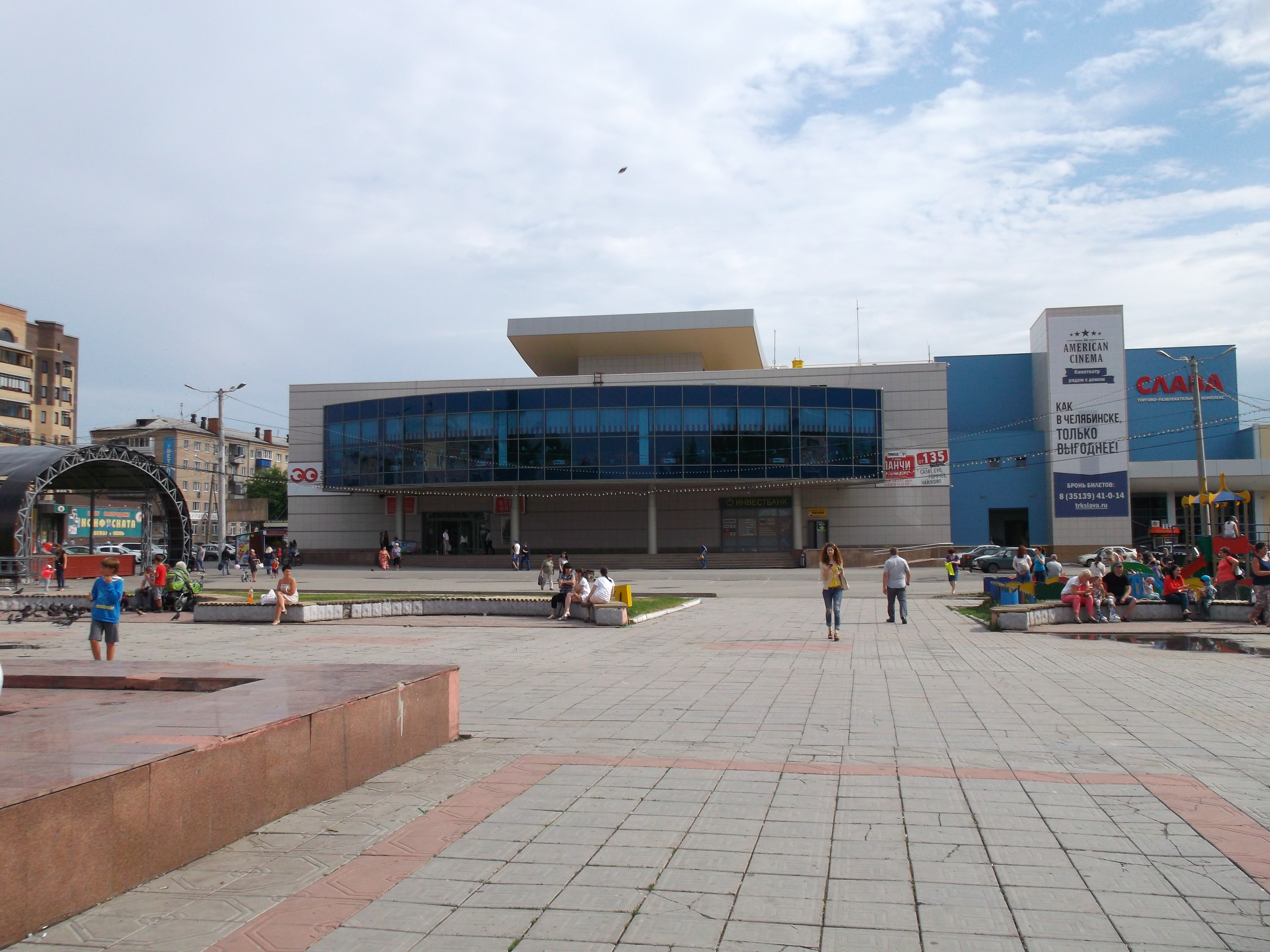 г. Копейск